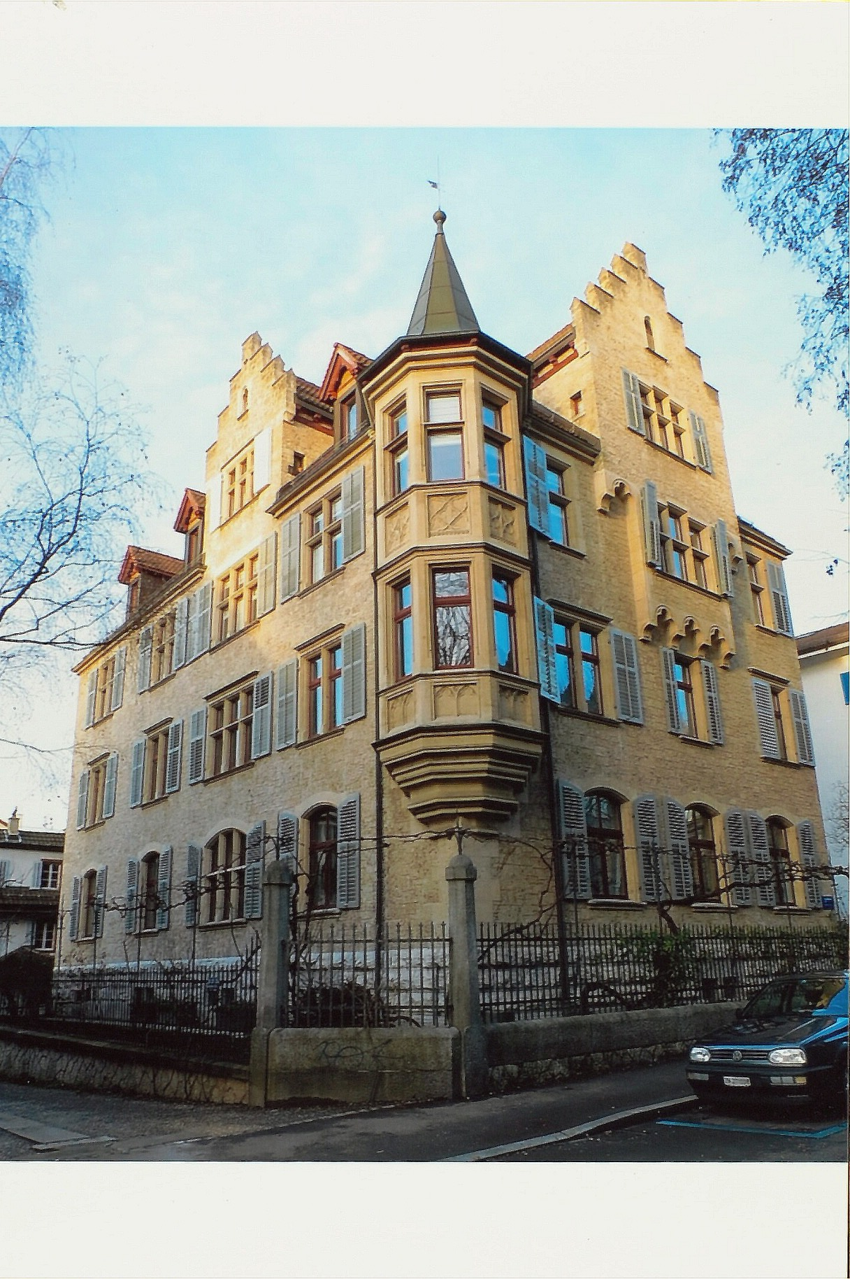 C.G. Jung Institut, Zürich-Hottingen, Schweiz